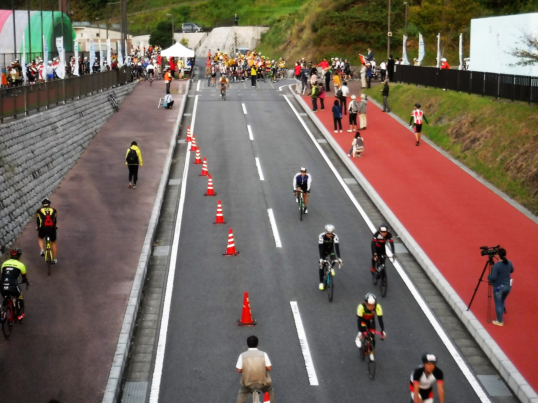 2017年、山口県柳井市で開催された、サザンセトロングライド。スタート地点